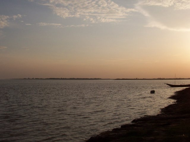 Padma river, Rajshahi, Bangladesh.